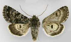 Lasionycta poca male